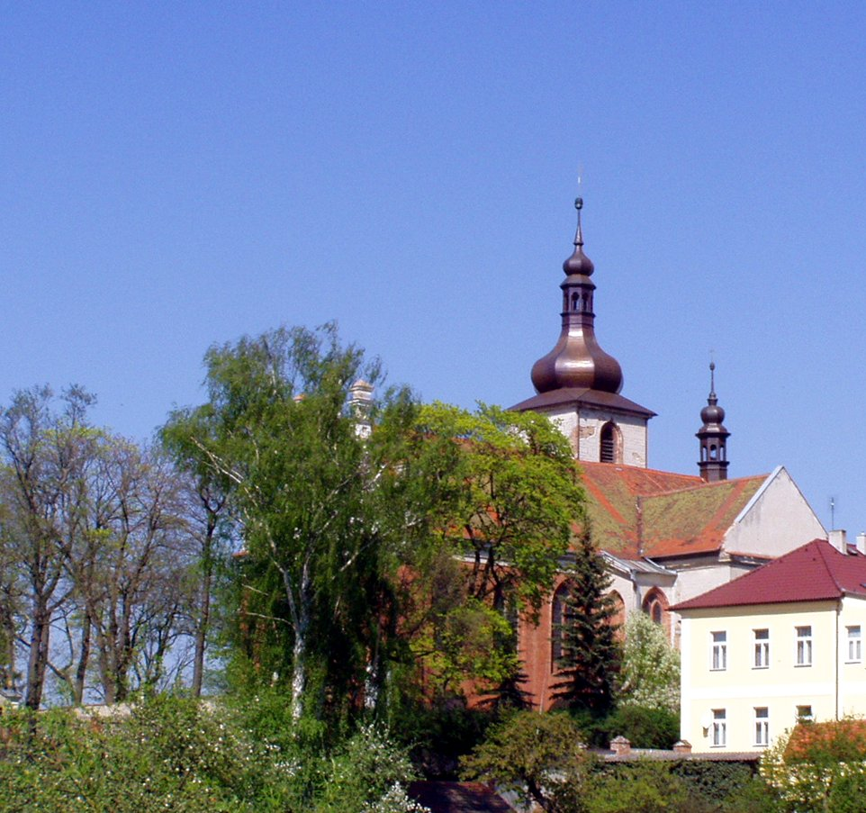 Kostel svatého Petra a Pavla z pohledu od Kralovického potoka.